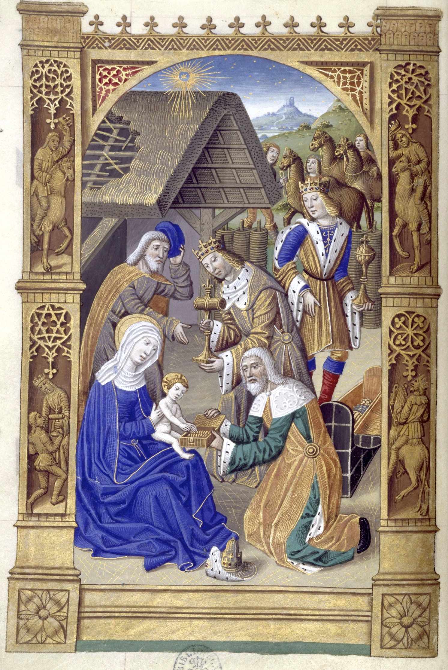 Heures de Charles VIII 042V Rois mages